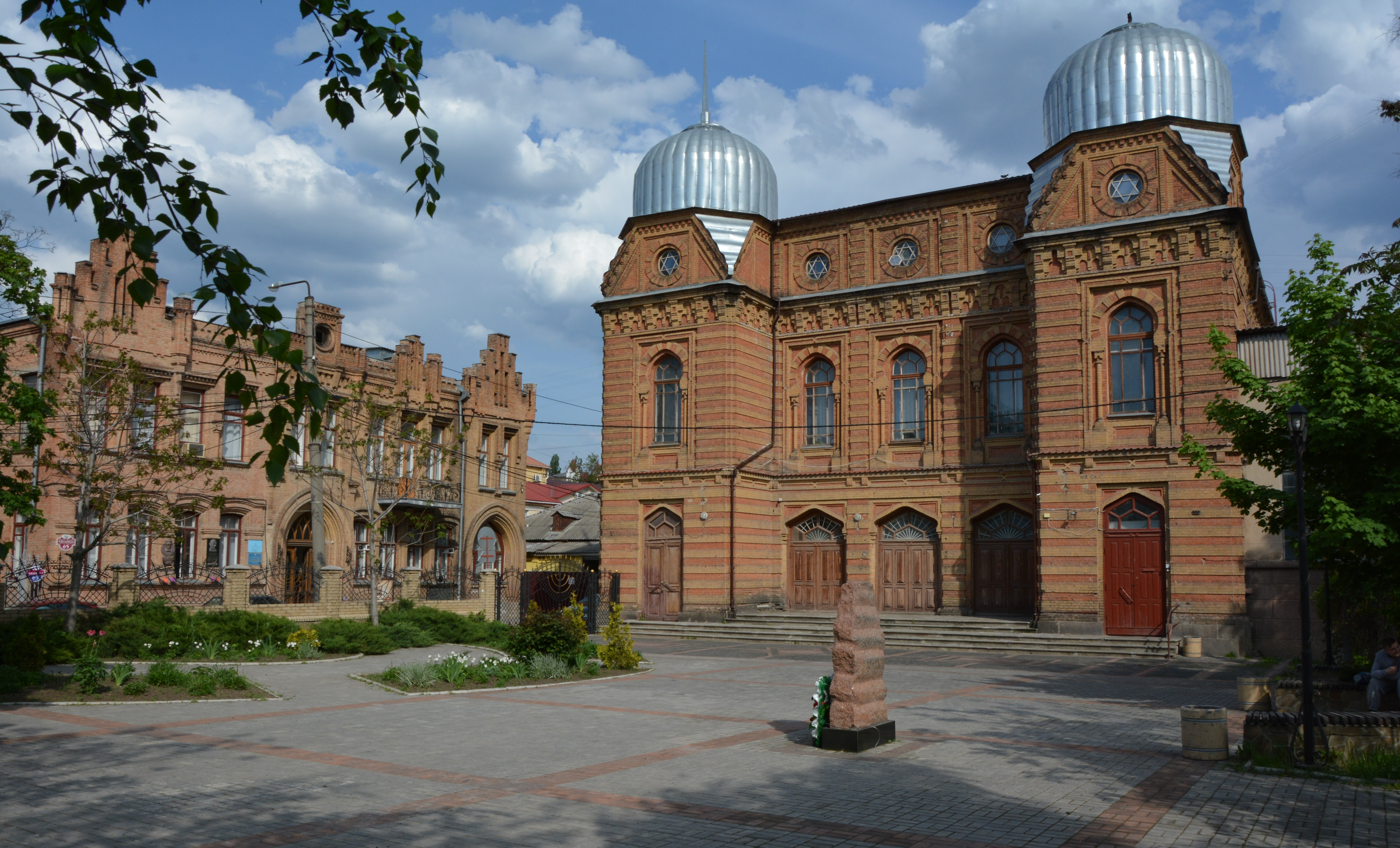 Синагога, Кропивницький, вул. В. Чміленка, 90/40 (Пашутінська)